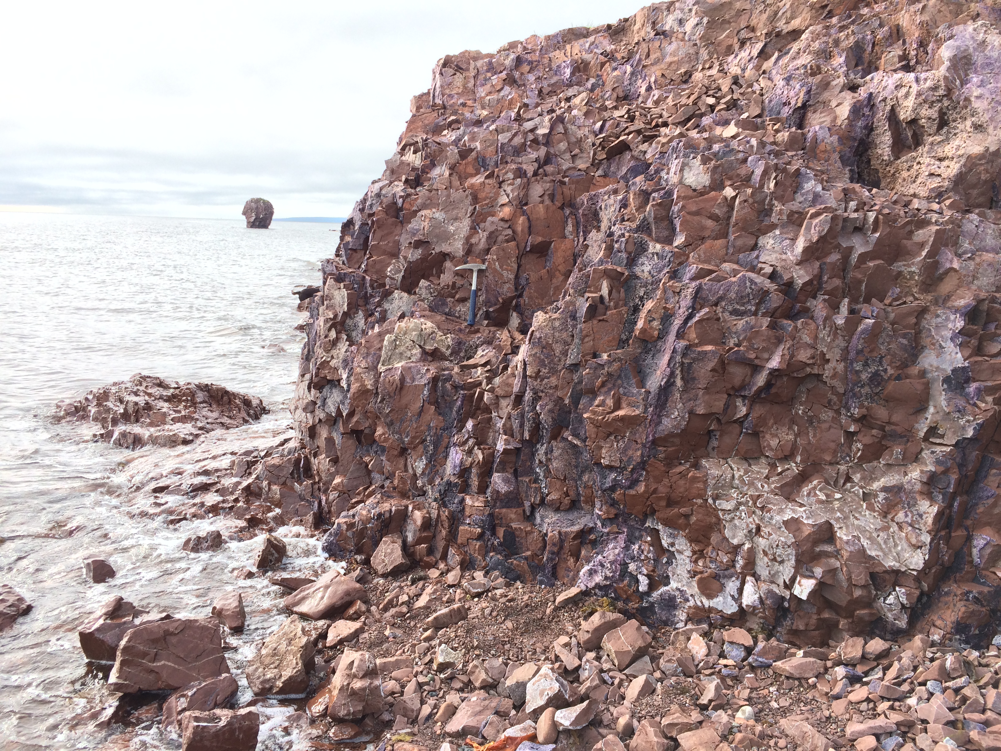 Мыс корабль и скала парус